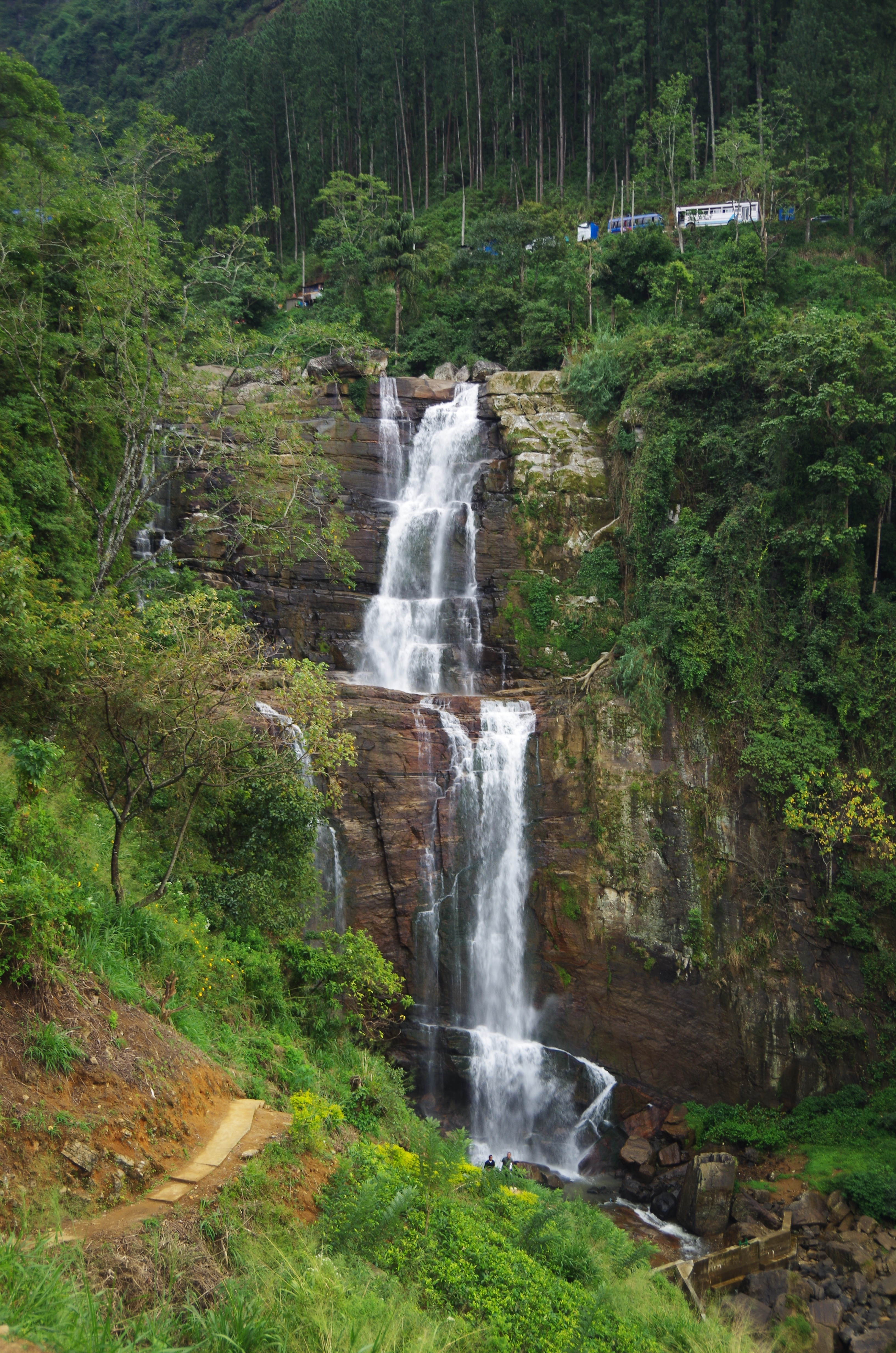 Ramboda Falls